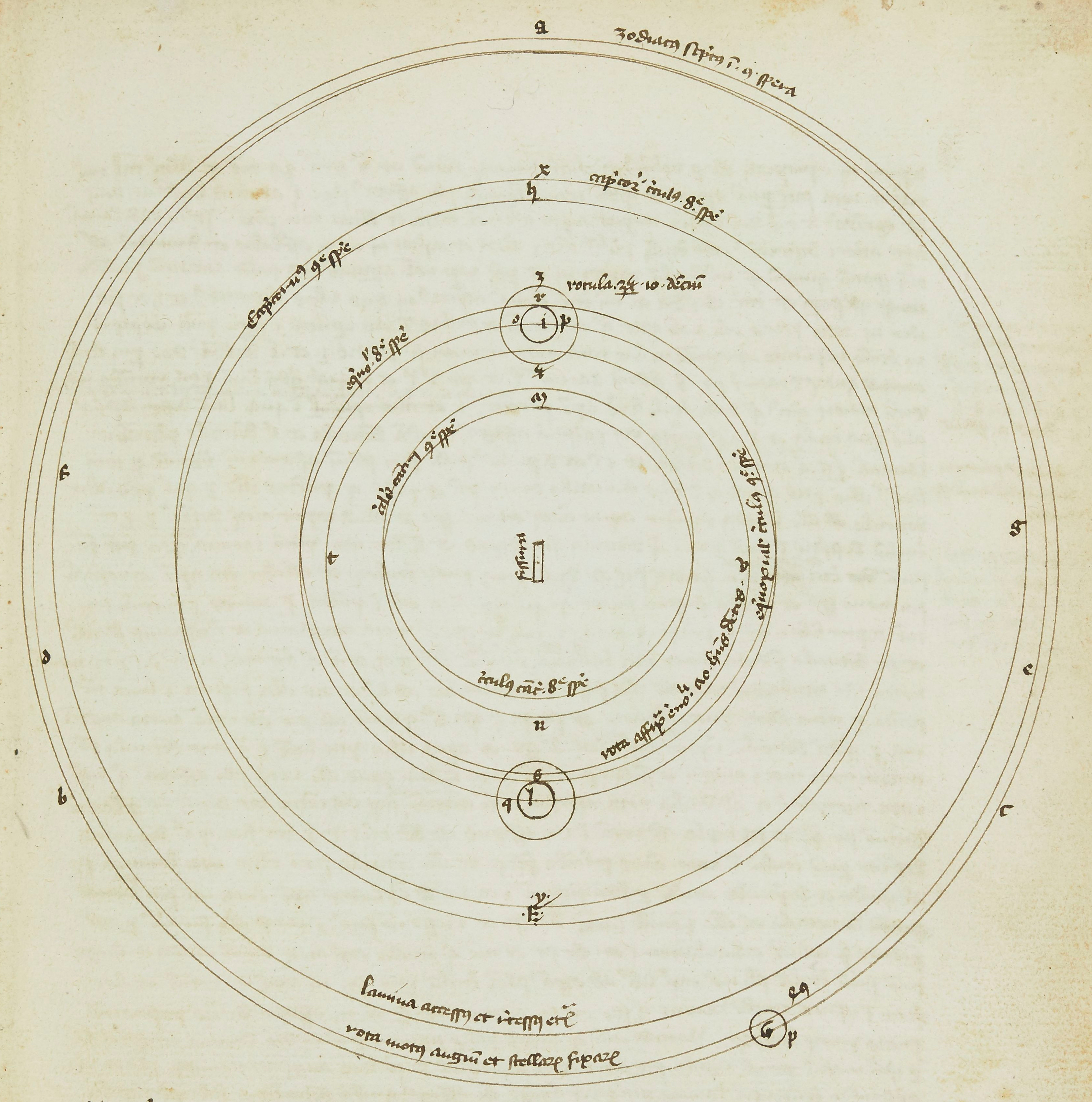 Système planétaire ; à comparer à l' univers ptolémaïque de Fusoris, 1431.